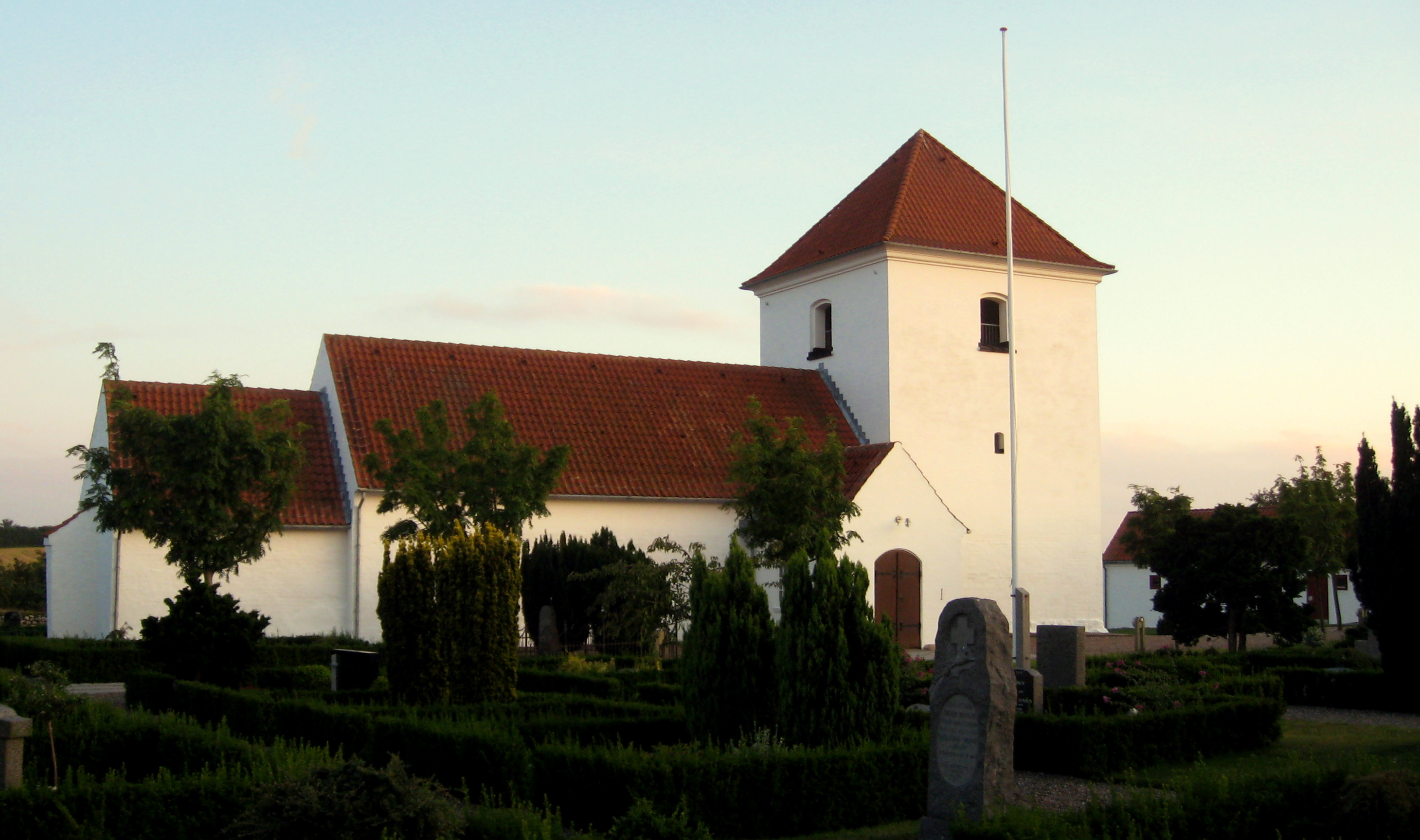 Gærum Kirke, Frederikshavn Kommune